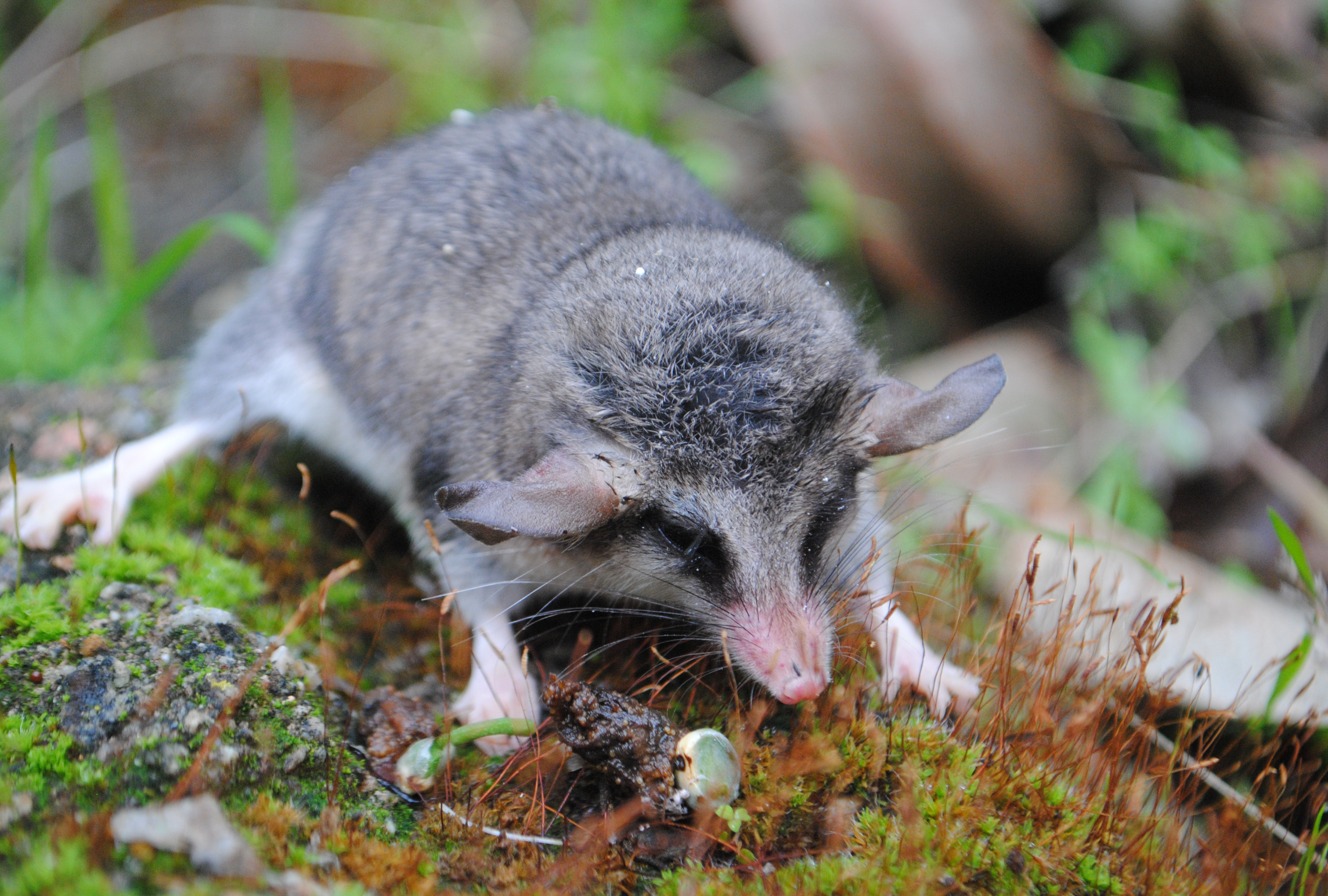 Thylamys elegans, comúnmente conocida como yaca, fotografiada en Punta Curaumilla, localidad de Laguna Verde, Región de Valparaíso, Chile.